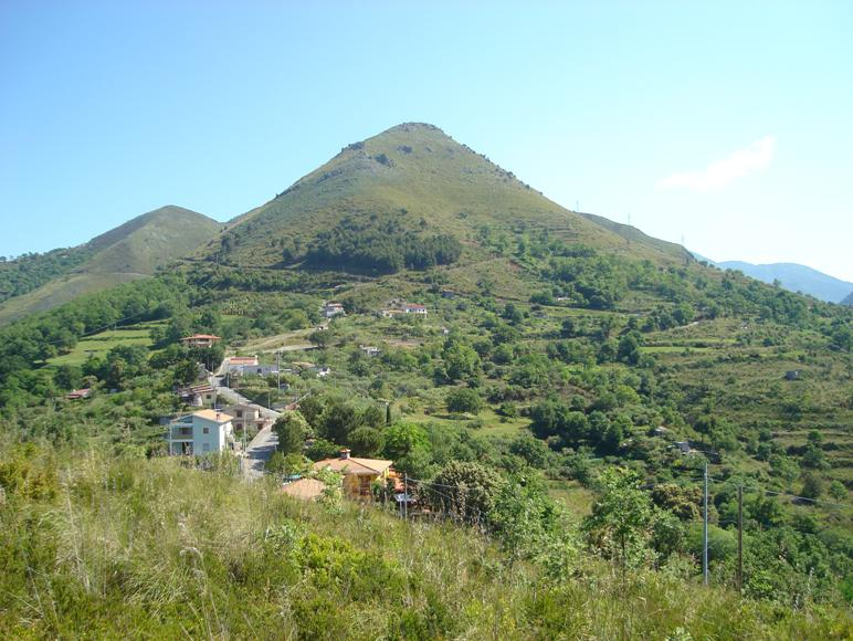 Francesco Stuppello, Tortora, Frazione Sarre